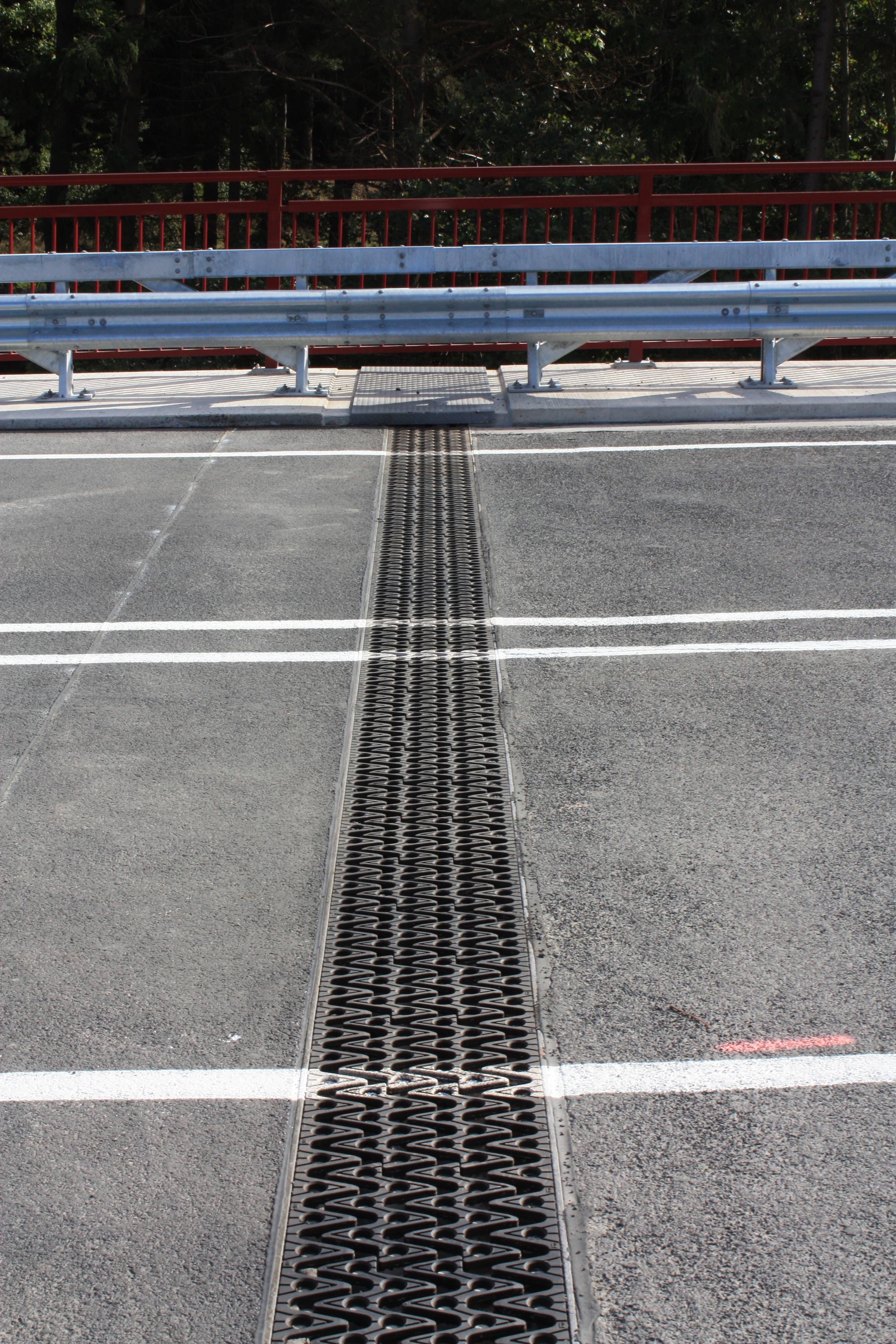 Übergangskonstruktion WSG PLUS mit aufgeschraubten, elastomerbeschichteten Sinunsplatten zur Lärmreduzierung